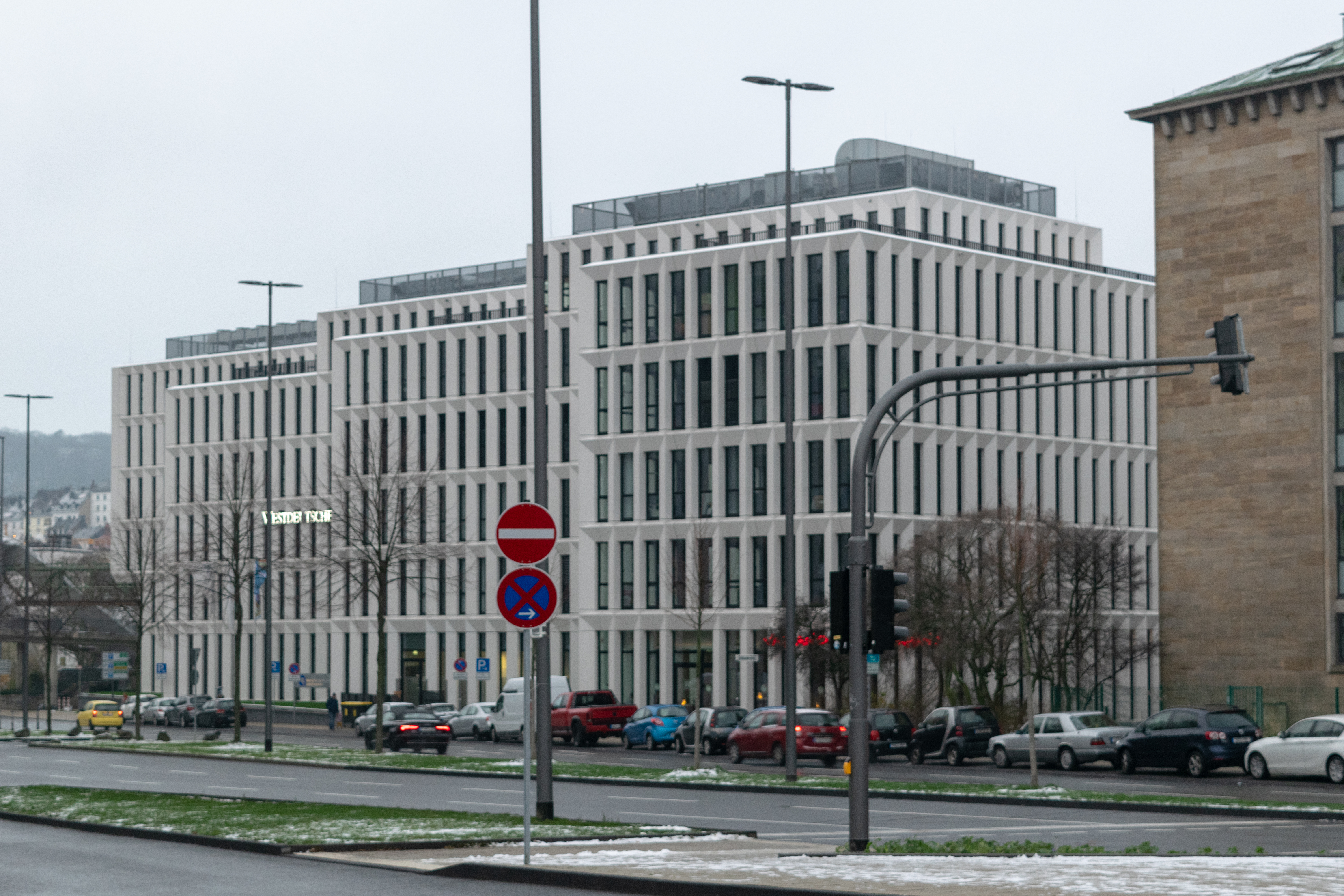 Bundesallee, Wuppertal